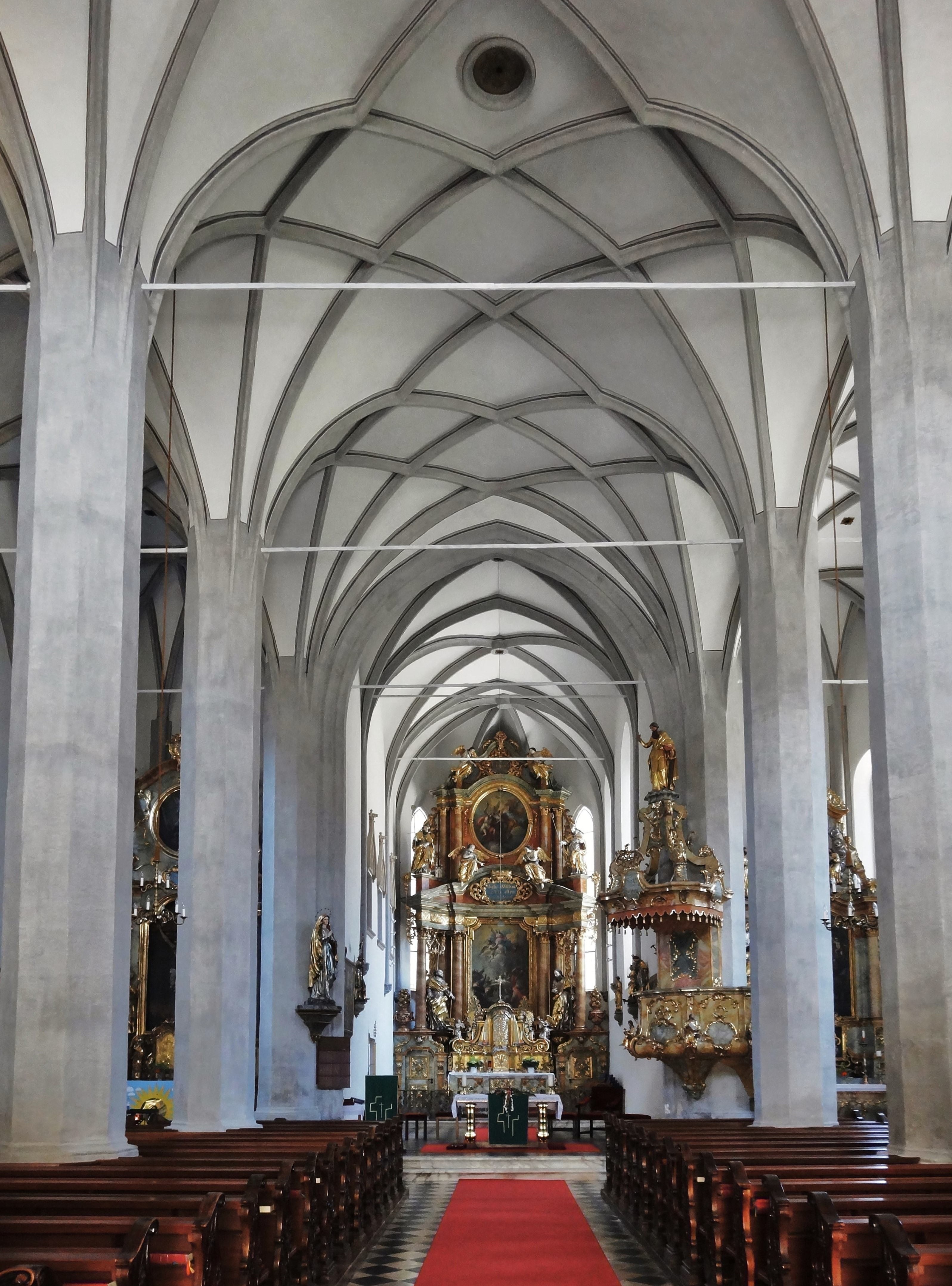 Kath. Pfarrkirche Mariä Himmelfahrt Gmünd in Kärnten, Innenansicht